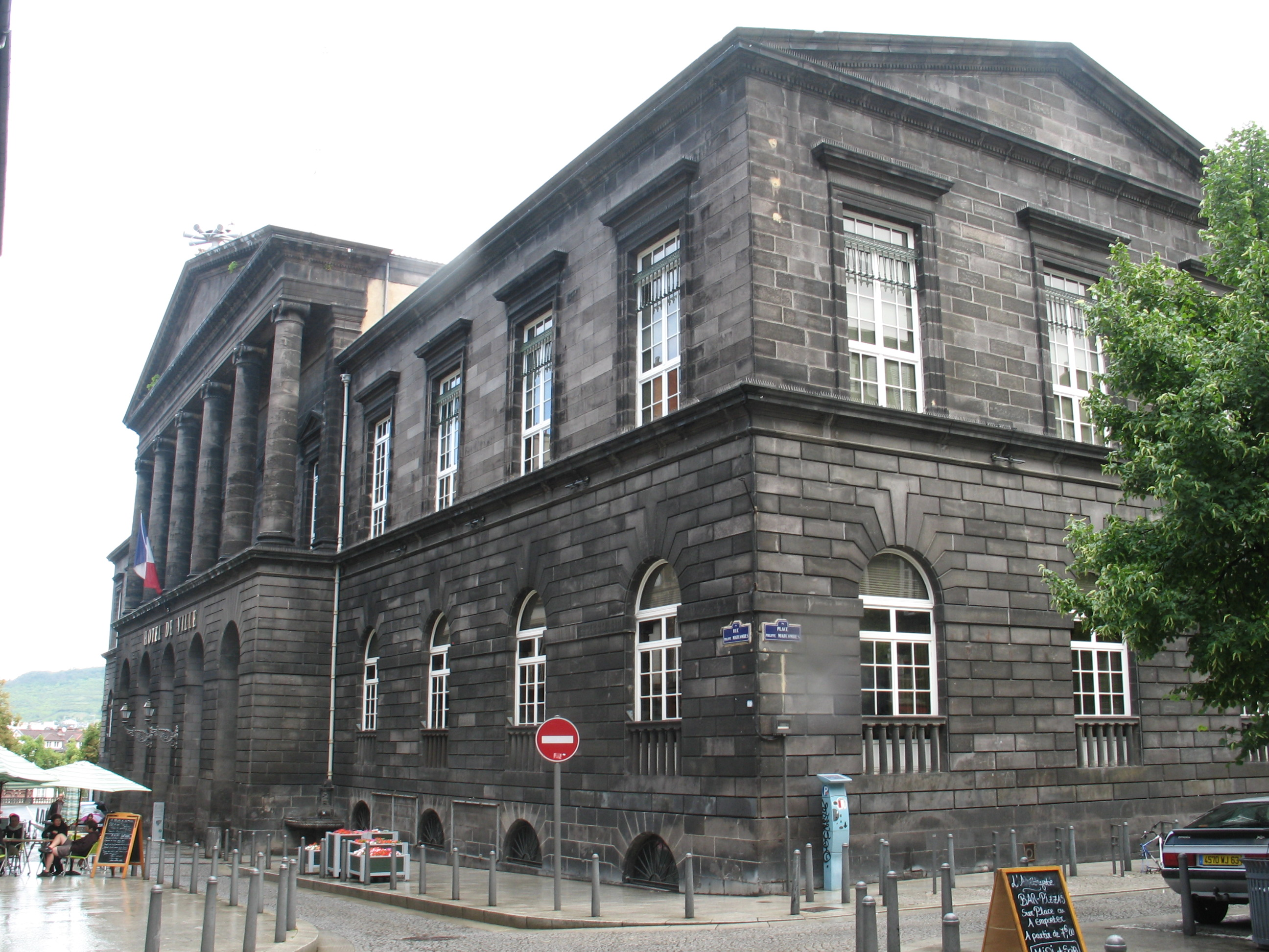 Hotel de ville de Clermont-Ferrand